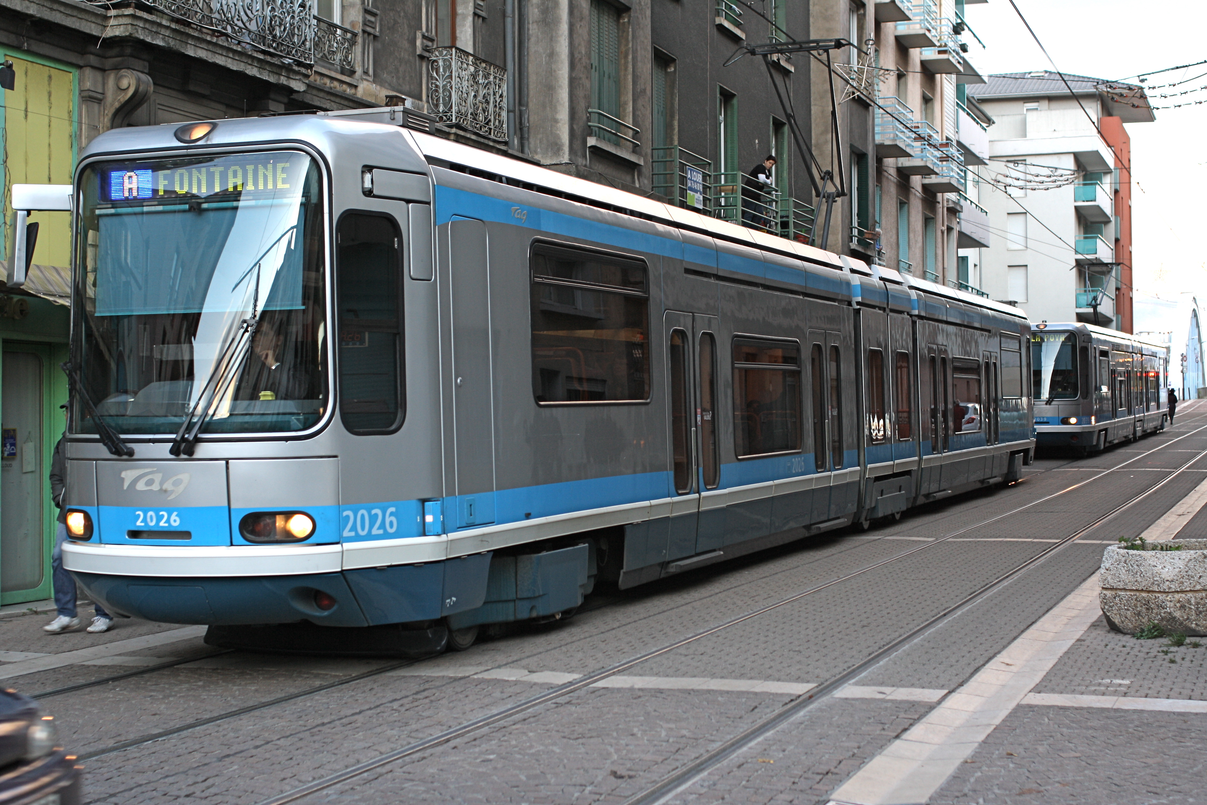 Tramway français standard Grenoble